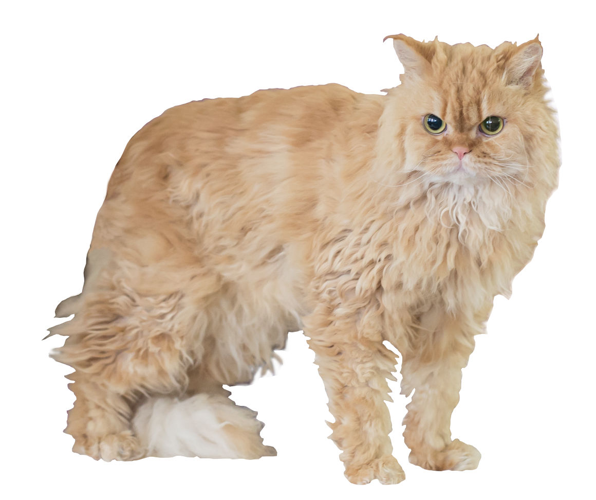 Selkirk à poil long sur fond blanc